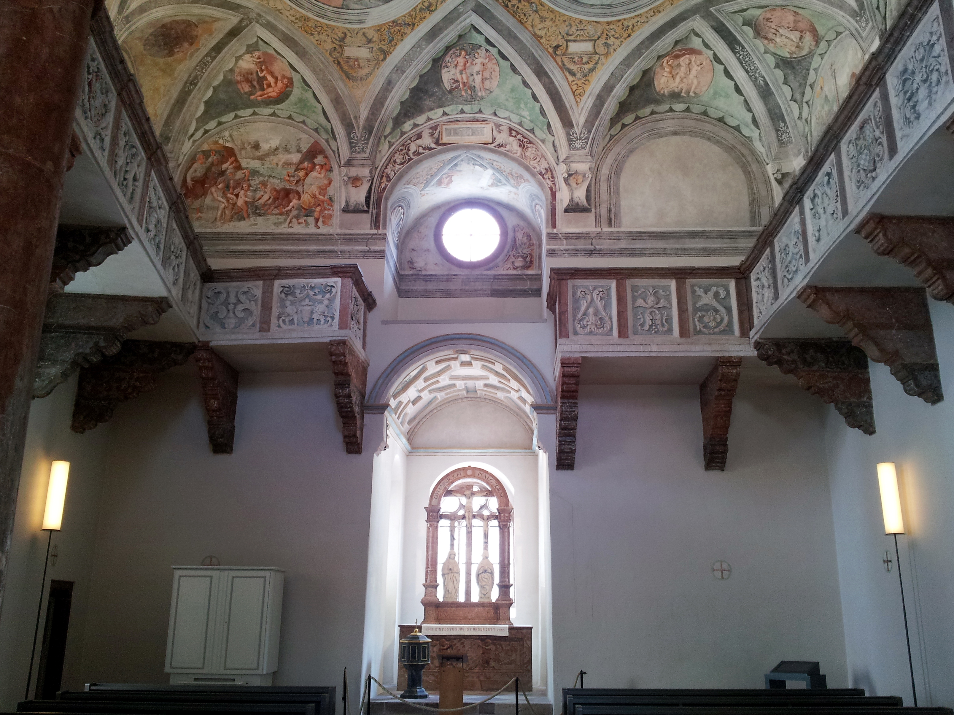 Die Schloßkapelle zu Neuburg a. d. Donau. Einer der frühesten evangelischen Kirchenräume im Spiegelbild von Reformation und Gegenreformation.